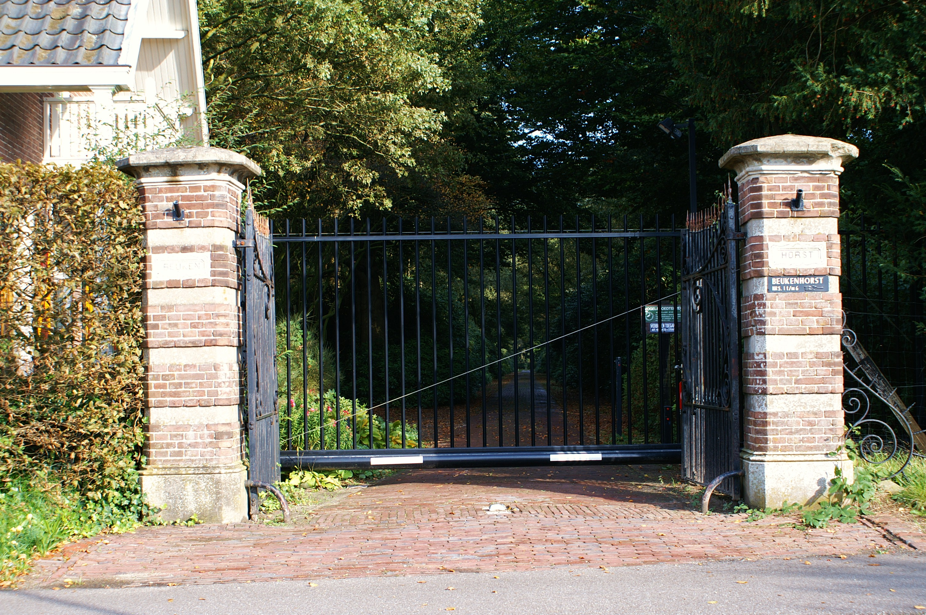 Het toegangshek tot landgoed Beukenhorst te Vught.